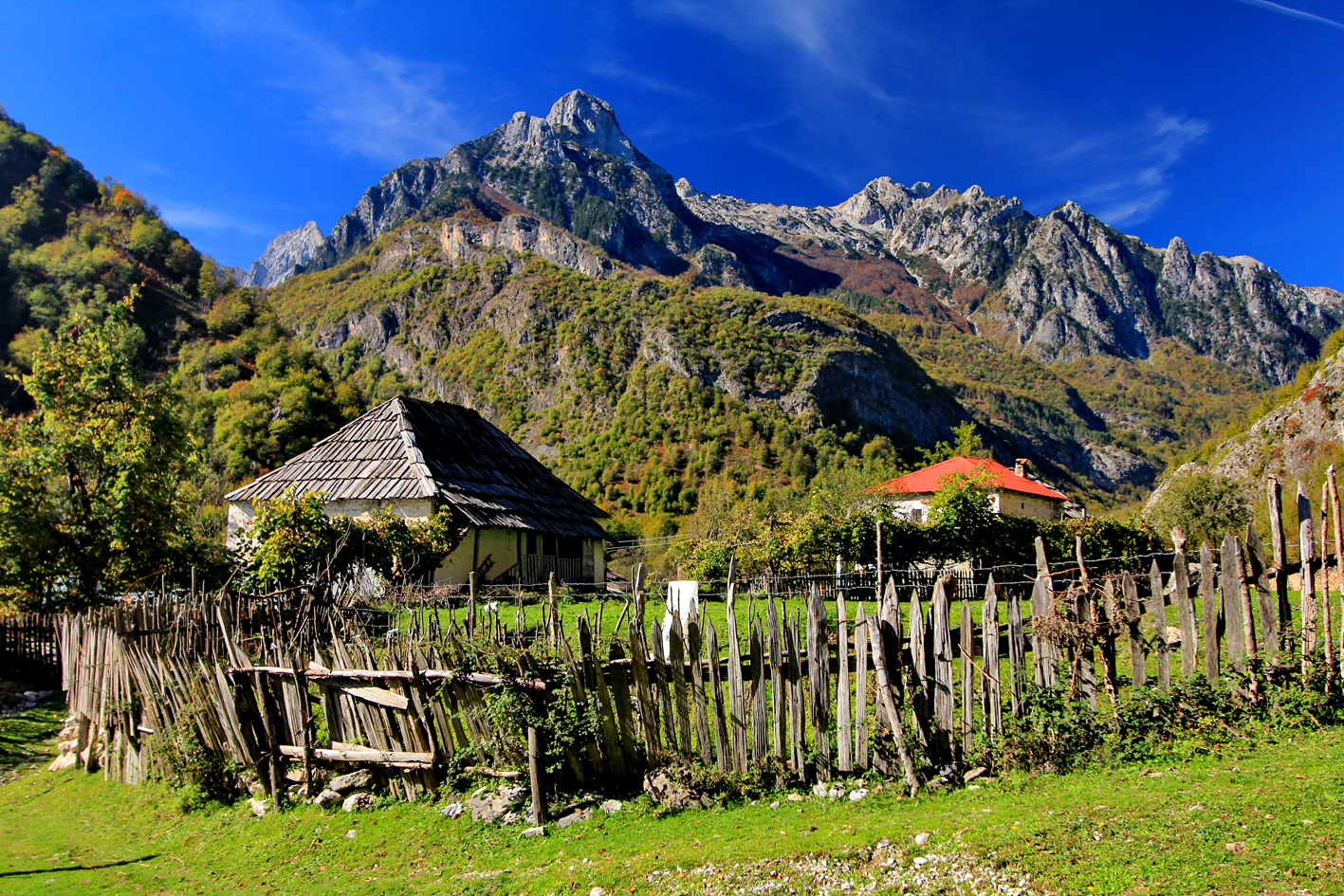 Pejzhazh Valbone 07